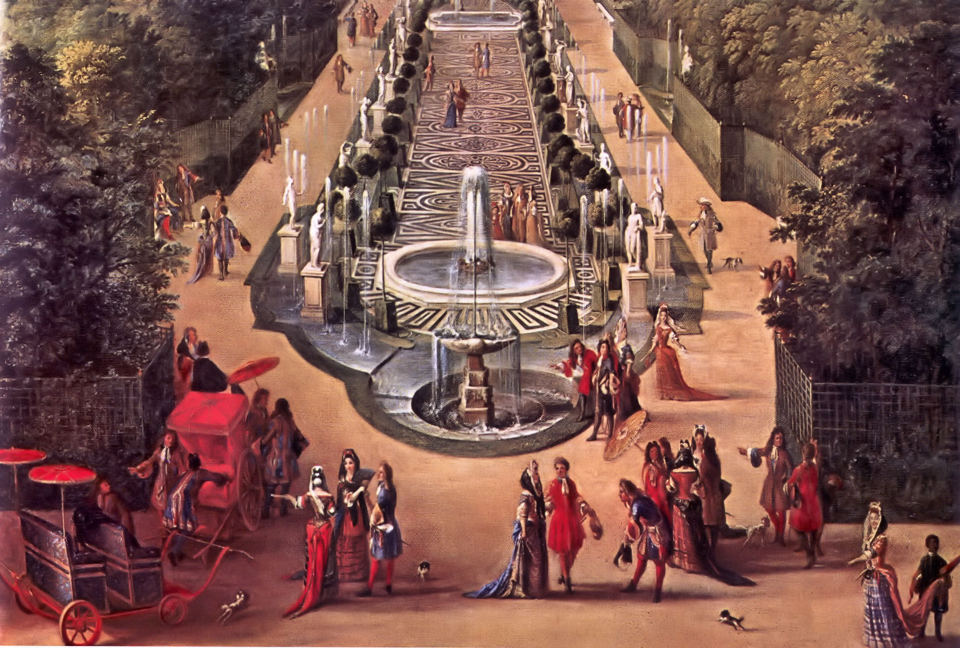 J. B. Martin: La Galerie des Antiques (dite aussi Galerie d'Eau), peinture, 1688. Ce bosquet des jardins du Château de Versailles (Yvelines, France), remanié au XVIIIe siècle est devenu la Salle des Marronniers